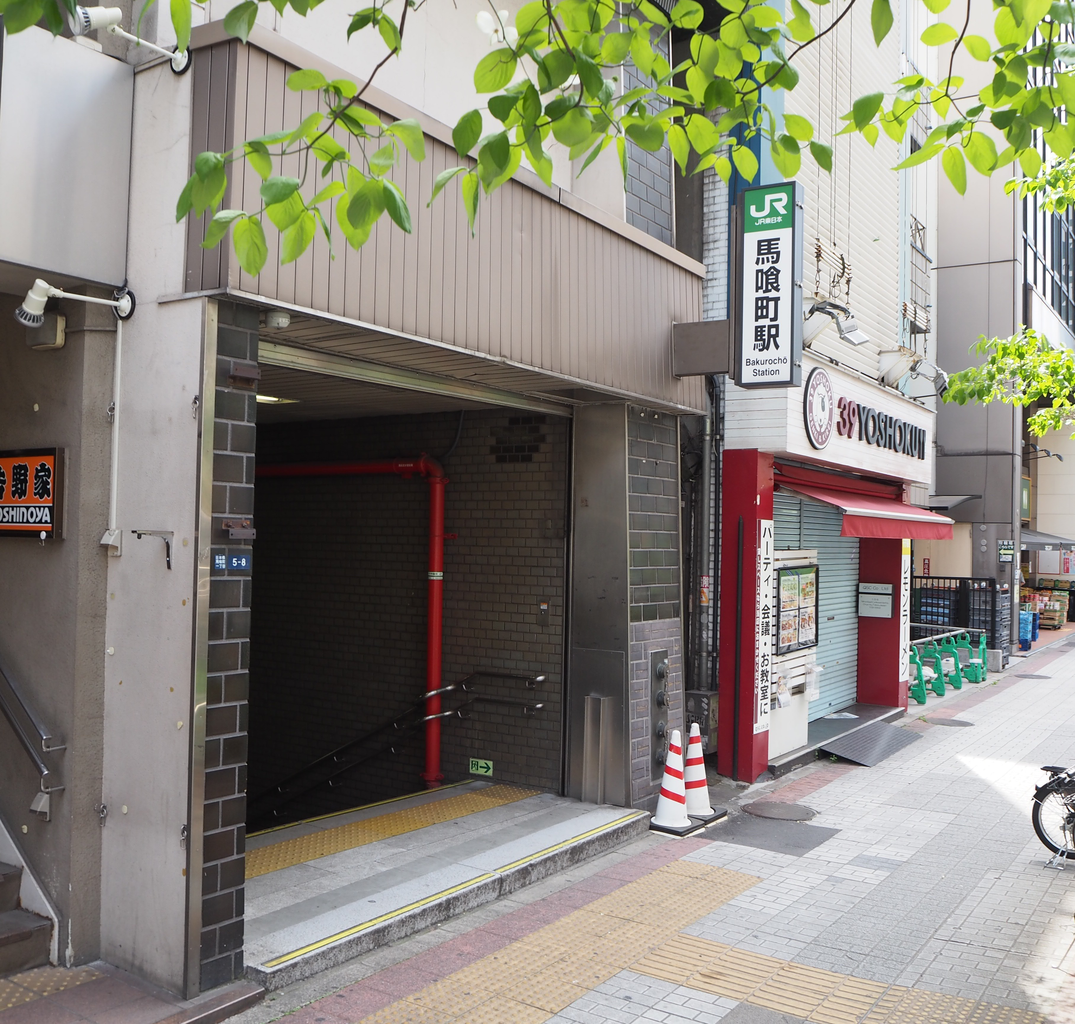 馬喰町駅1番出入口